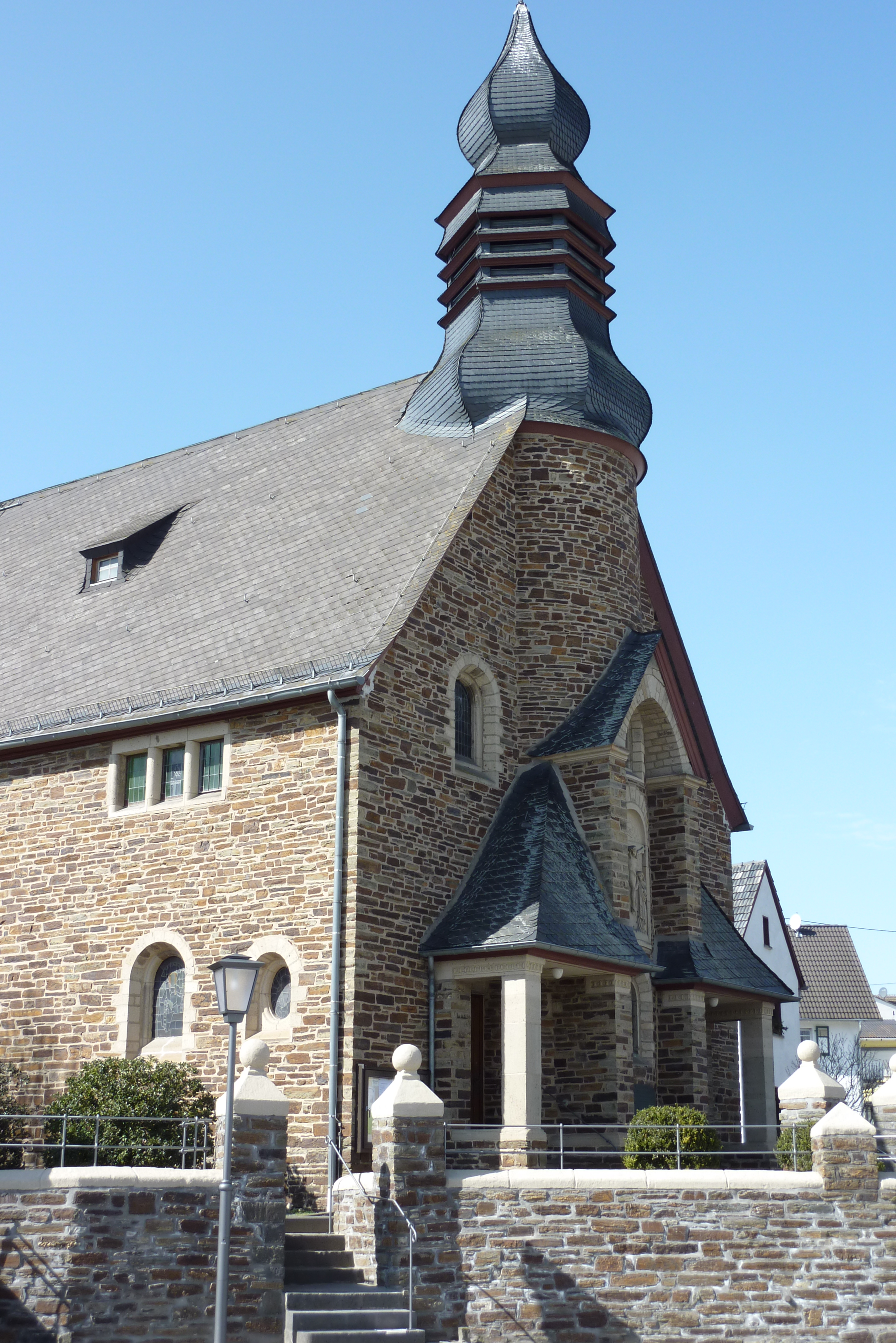 Außenansicht der Kirche St. Barbara in Ramersbach, einem Stadtteil von Bad Neuenahr-Ahrweiler